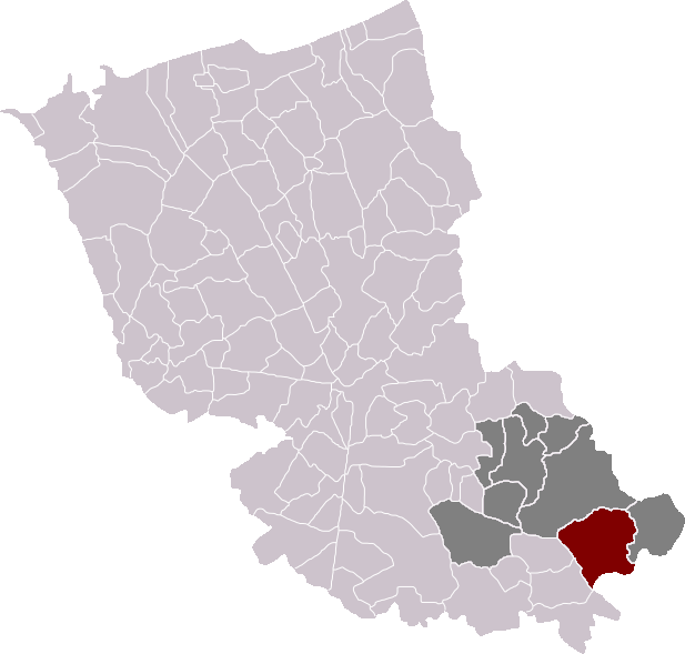 Locatie gemeente Steenwerk in arrondissement Duinkerke. Zelfgemaakt. Location of Steenwerck municipality in the arrondissement of Dunkirk. Self made. Localisation de la commune de Steenwerck dans l'arrondissement de Dunkerque. Fait moi-même.